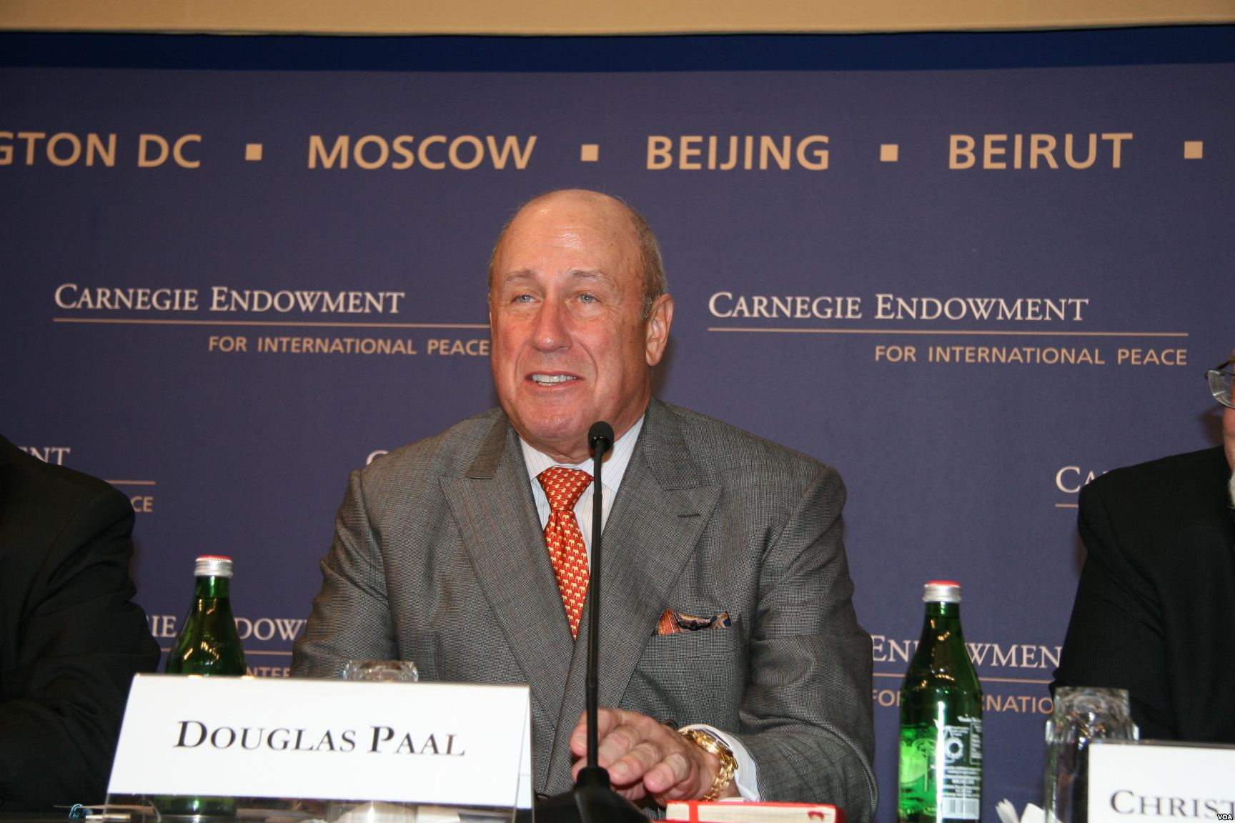 卡内基国际和平基金会研究副总裁包道格。